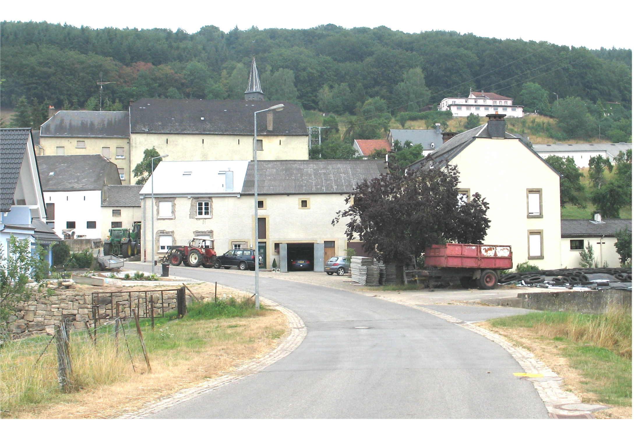 Bigelbaach